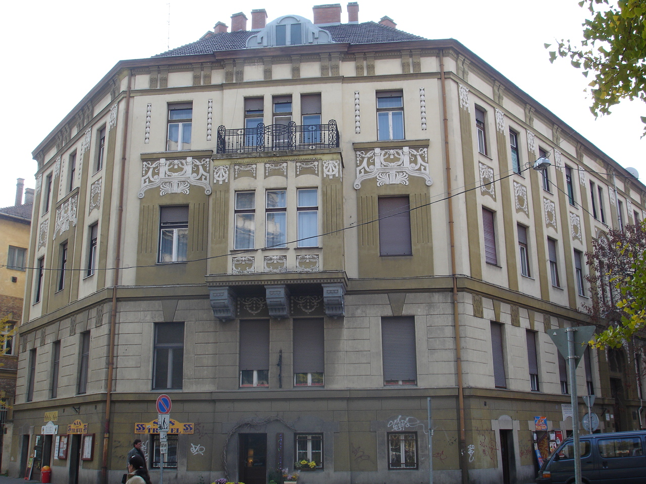 Erdélyi és Kopasz cég építész irodája Szeged, Deák Ferenc utca 2. sz alatt, tervezte: Erdélyi Mihály, 1905.